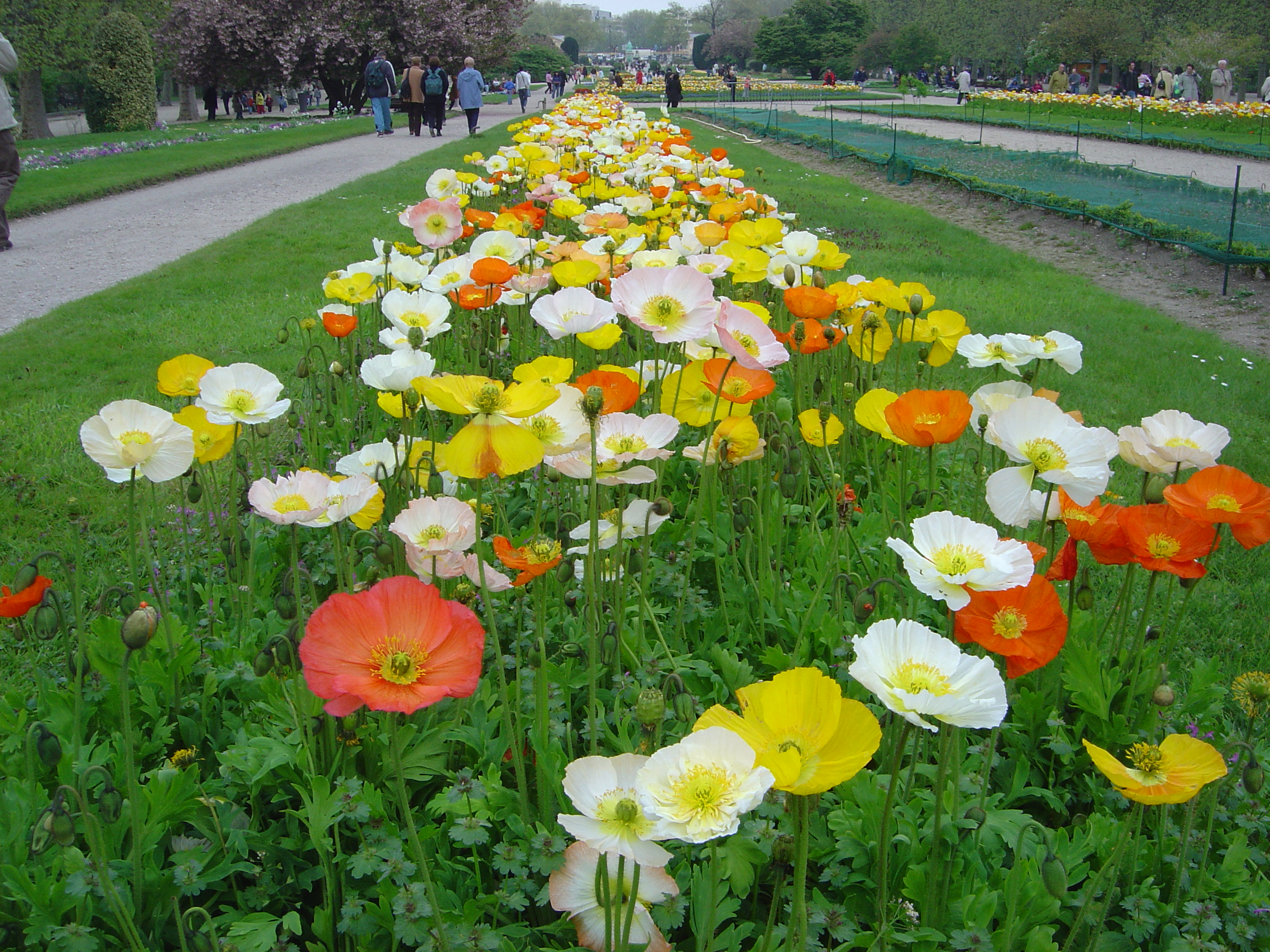 Papaver nudicaule En: Photograph taken at the Jardin des Plantes in Paris, France Fr: Photographie prise au Jardin des Plantes à Paris, France